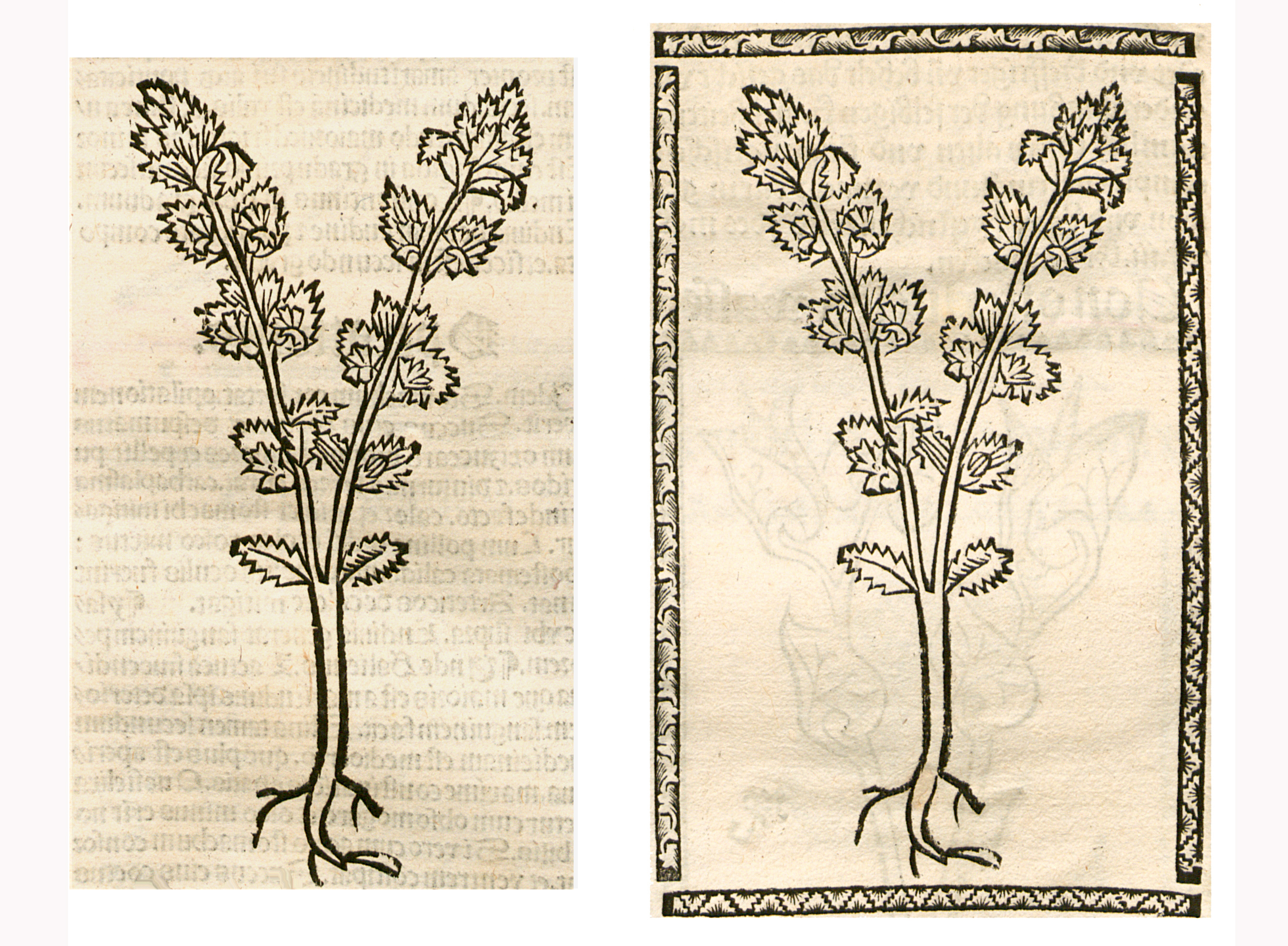 Abbildung von: Ougen Trost (Euphrasia rostkoviana)